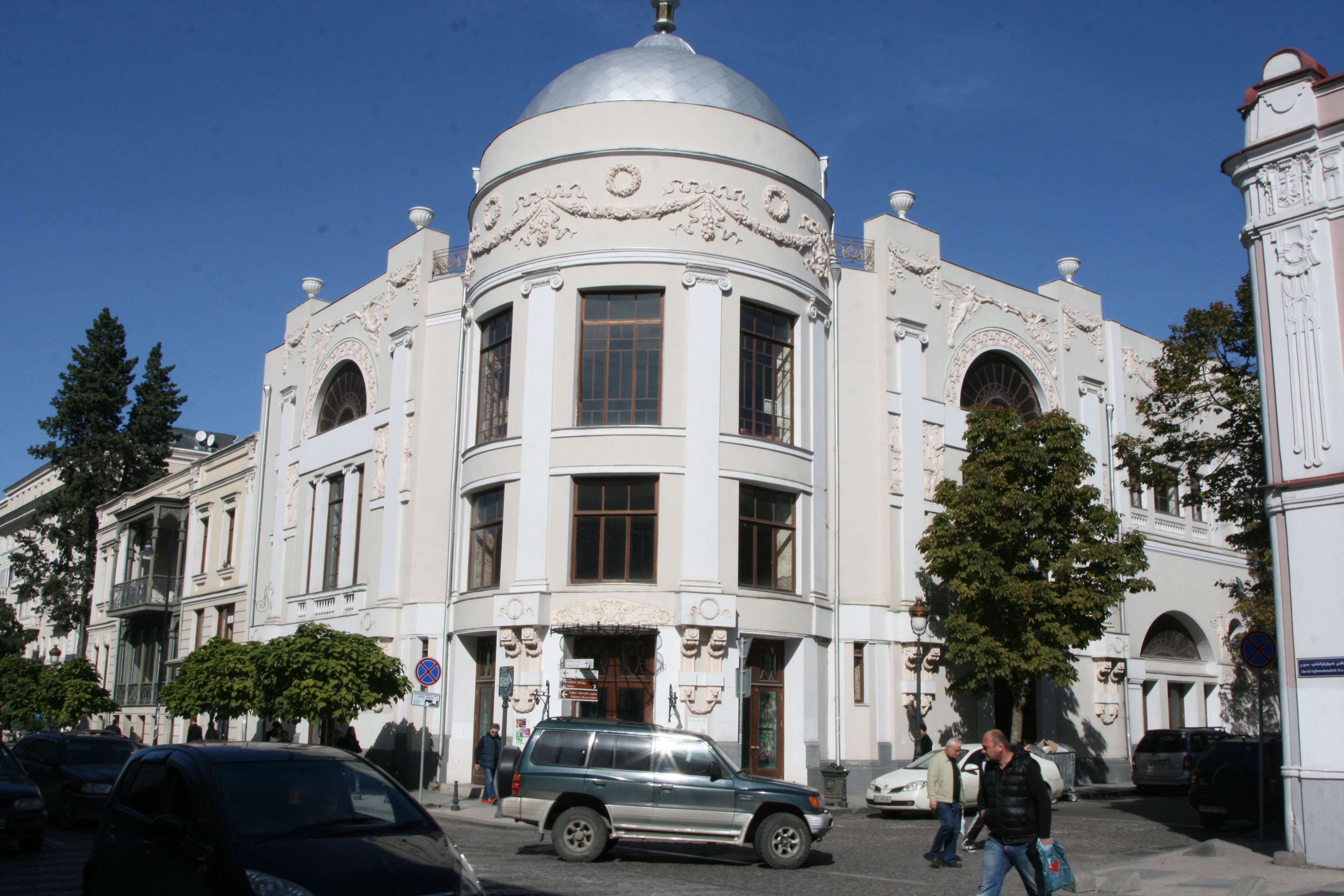 Dzveli Tbilisi, Tbilisi, Georgia